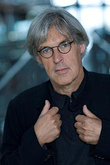 Porträt K.M.